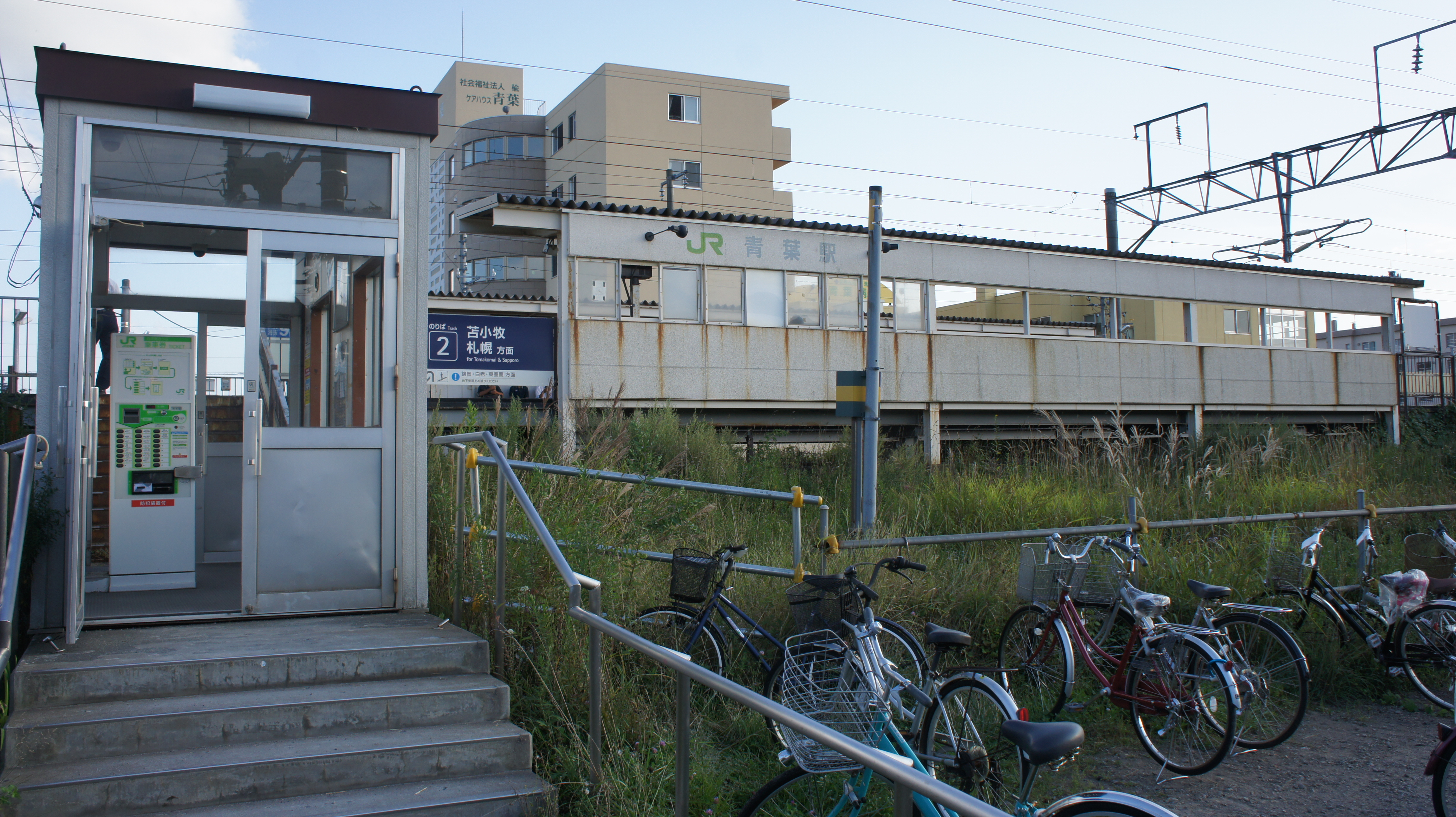 JR室蘭本線・青葉駅の上り線外観